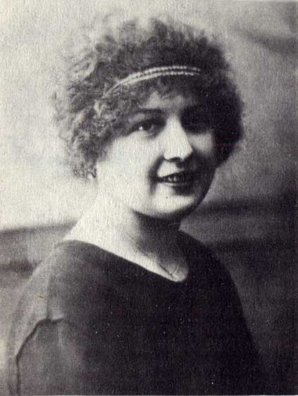 Жонка ўпраўляючага маёнткам Бастынь Л. Ігнацьева ў гарадскім убранні. 1915